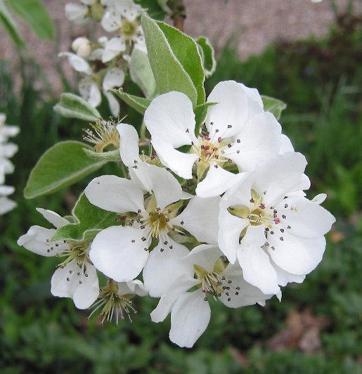 zelfgemaakte foto van een perebloem